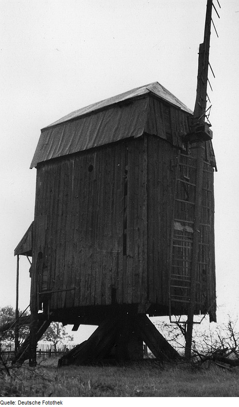 Original image description from the Deutsche FotothekHirschstein-Heyda. Bockmühle